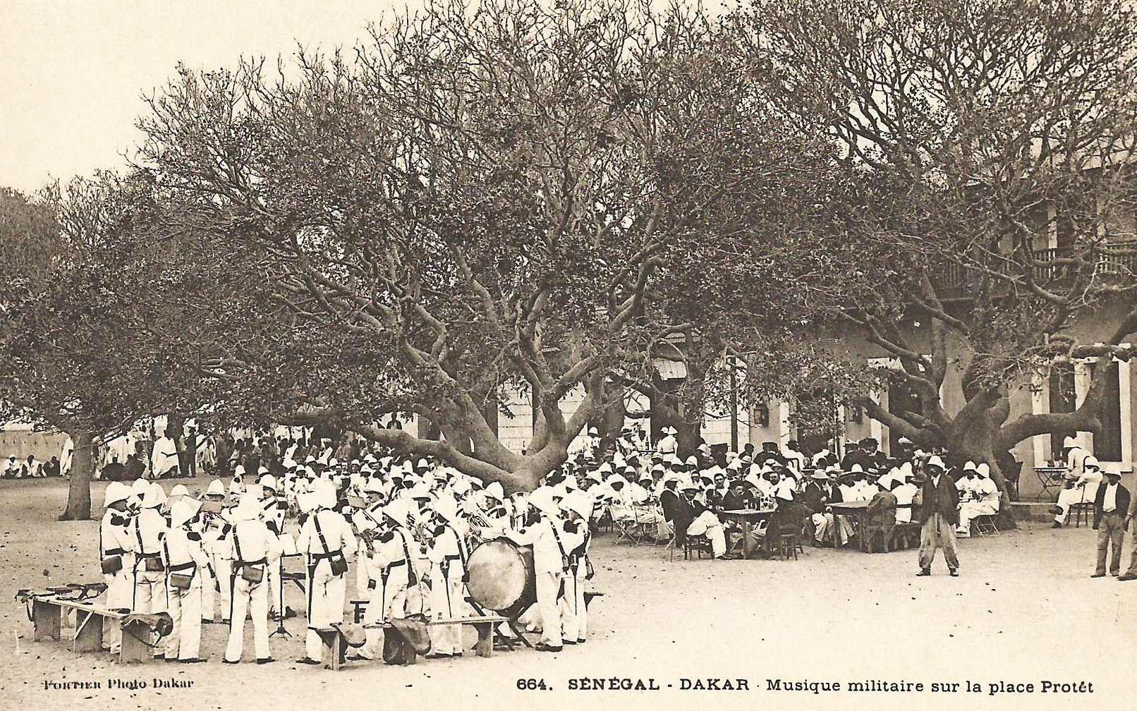 François-Edmond Fortier, Dakar. Musique militaire sur la place Protêt. Afrique Occidentale - Sénégal.